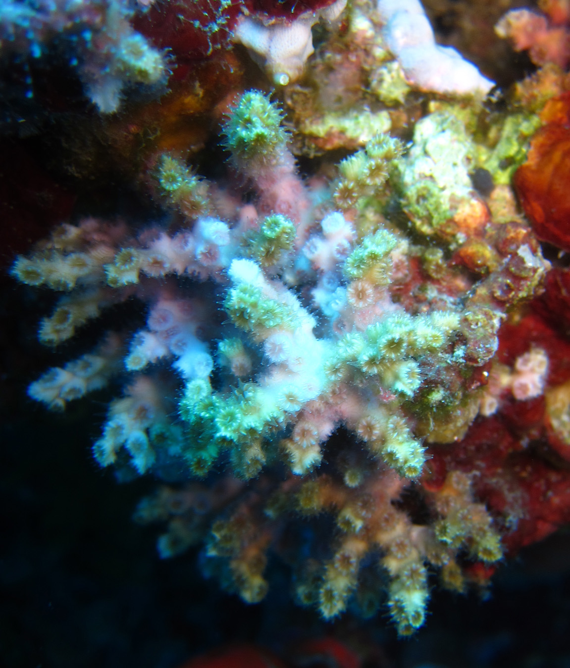 Oculina diffusa en Flower Garden Banks, EE.UU.